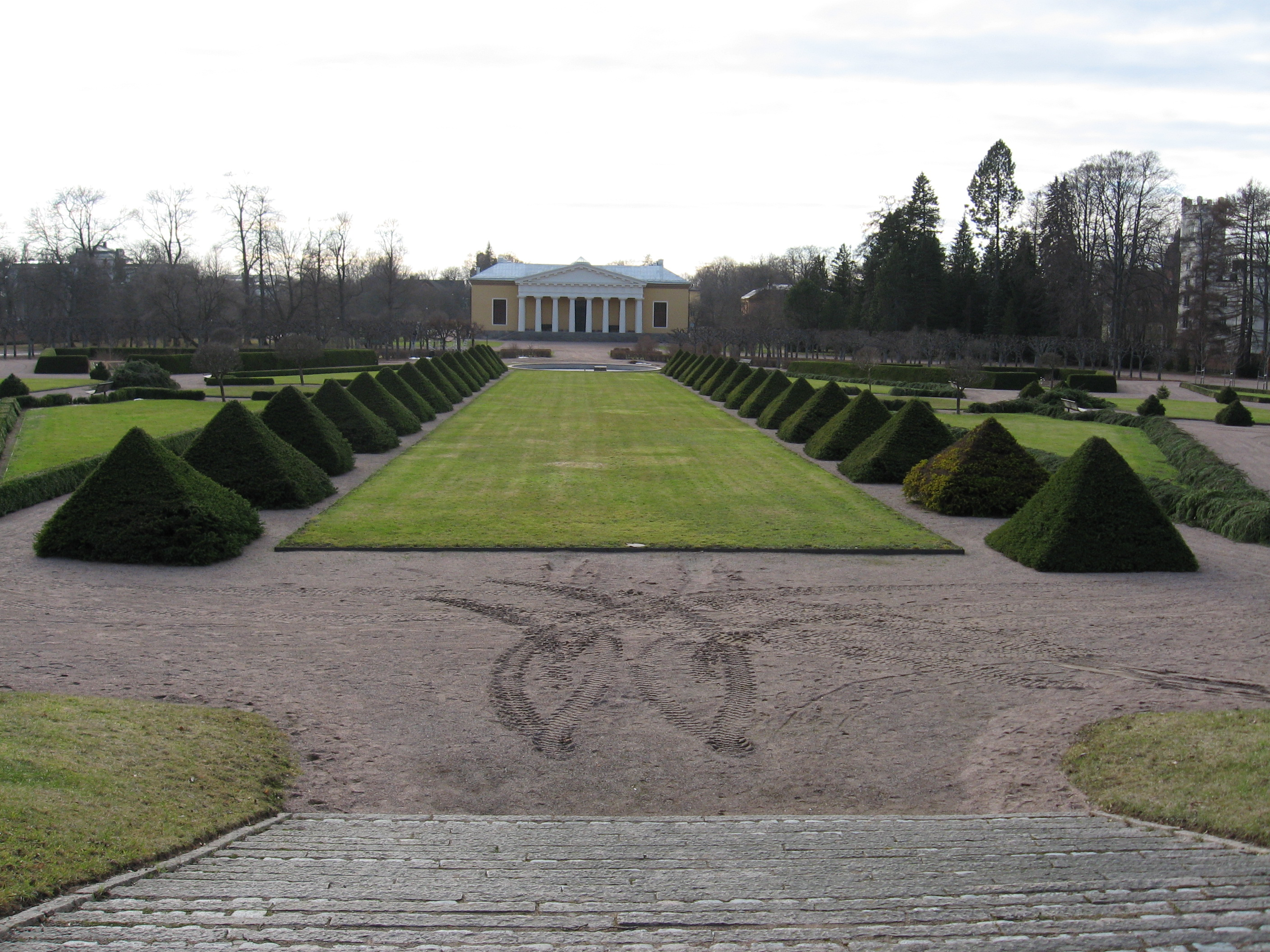 Botaniska trädgården i Uppsala, våren 2007